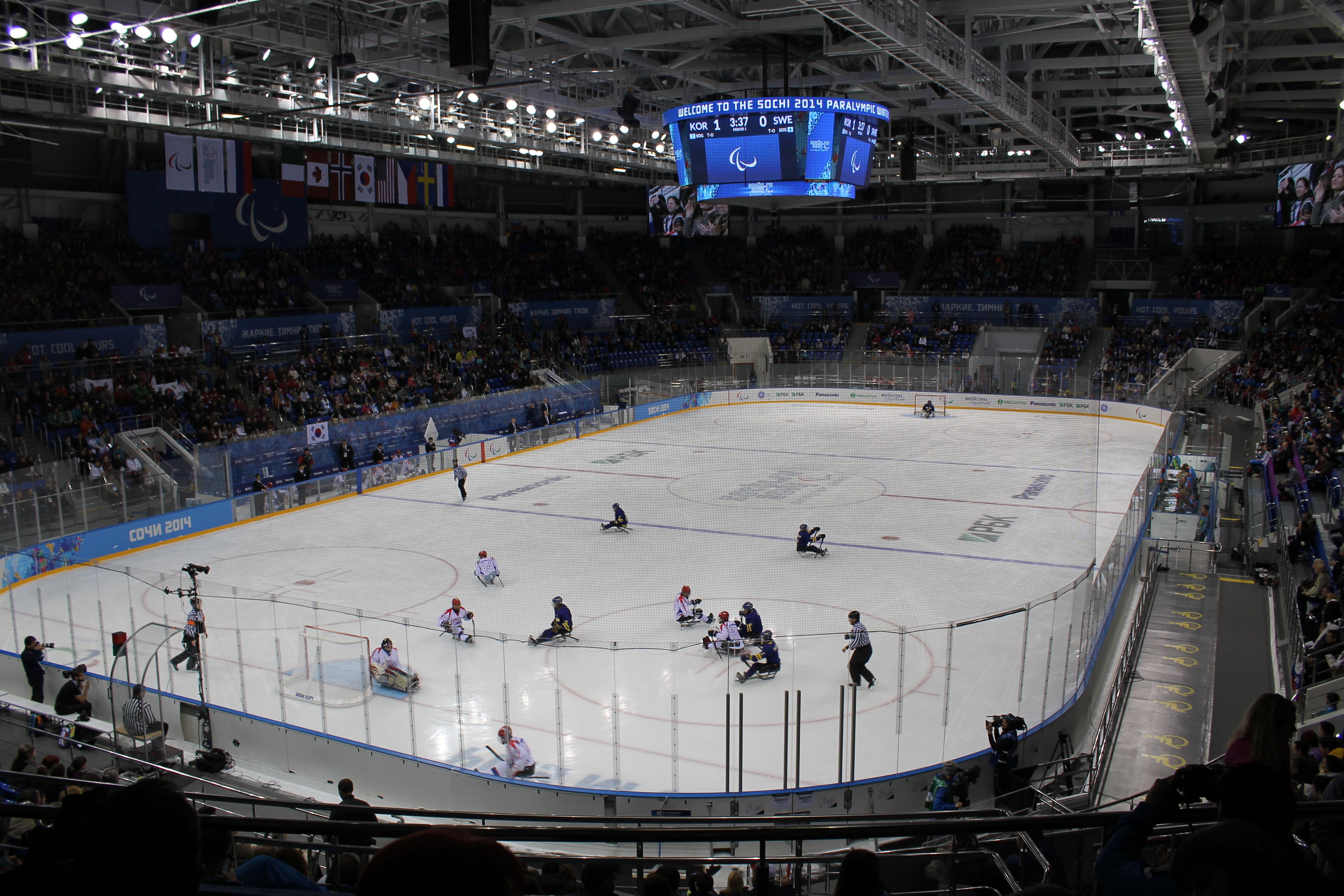 Встреча по слейдж-хоккею между командами Южной Кореи и Швеции на зимних Паралимпийских играх 2014 в Сочи